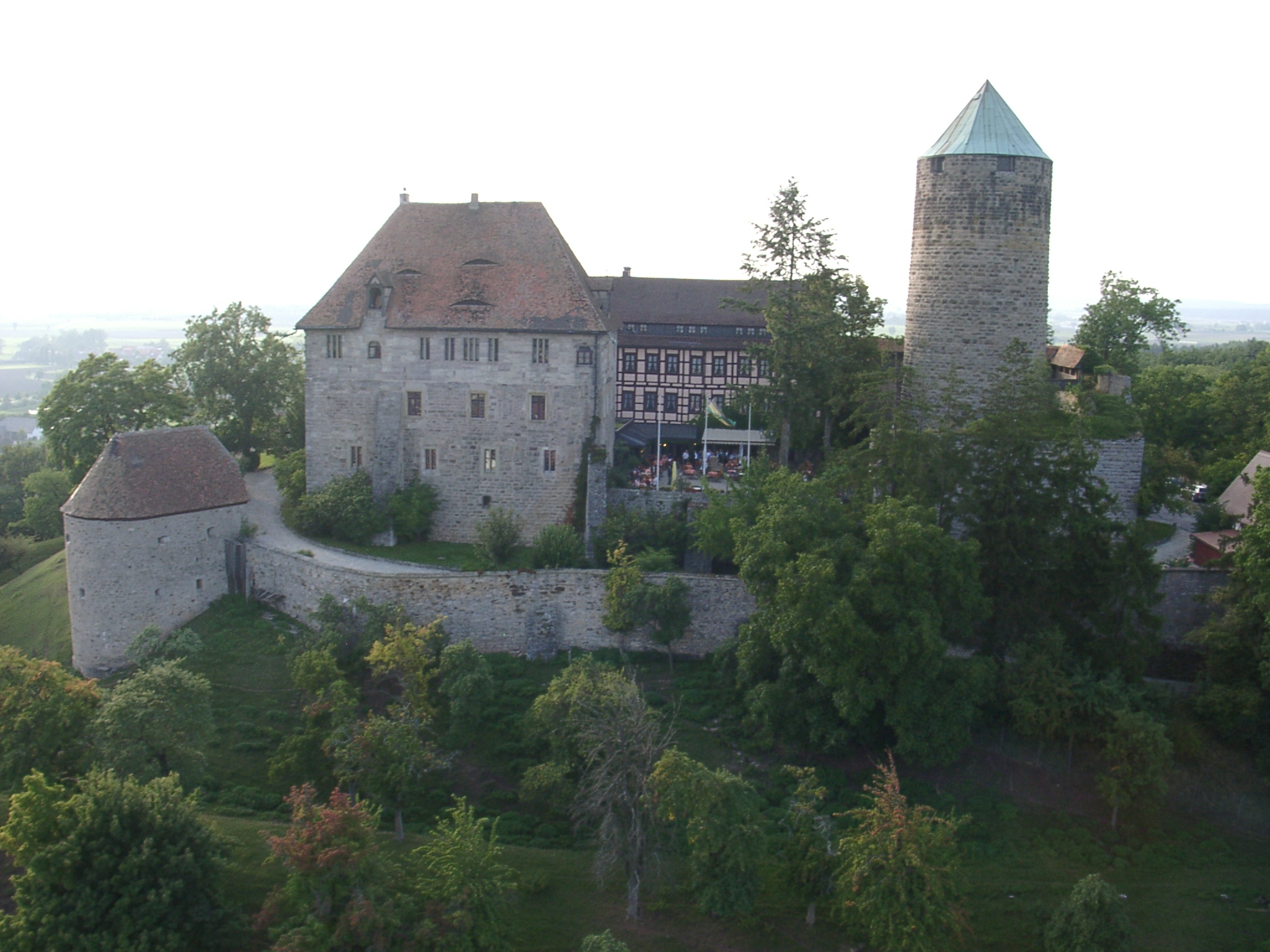 Burg Colmberg aus der Luft.